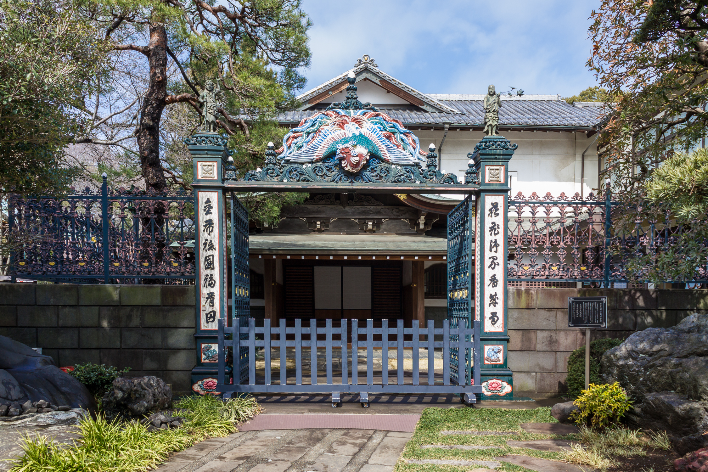 妙法寺鉄門（国の重要文化財・東京都杉並区）